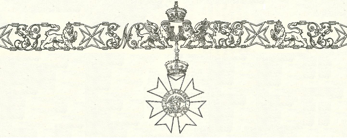 Scan van Blz. 104 en 108 van het boek "Handbuch der Ritter- und Verdienstorden " uitgegeven 1893 door Weber.Tekening van de in 1902 overleden Maximilian Gritzner. Robert Prummel 10 jul 2008 16:40 (CEST)